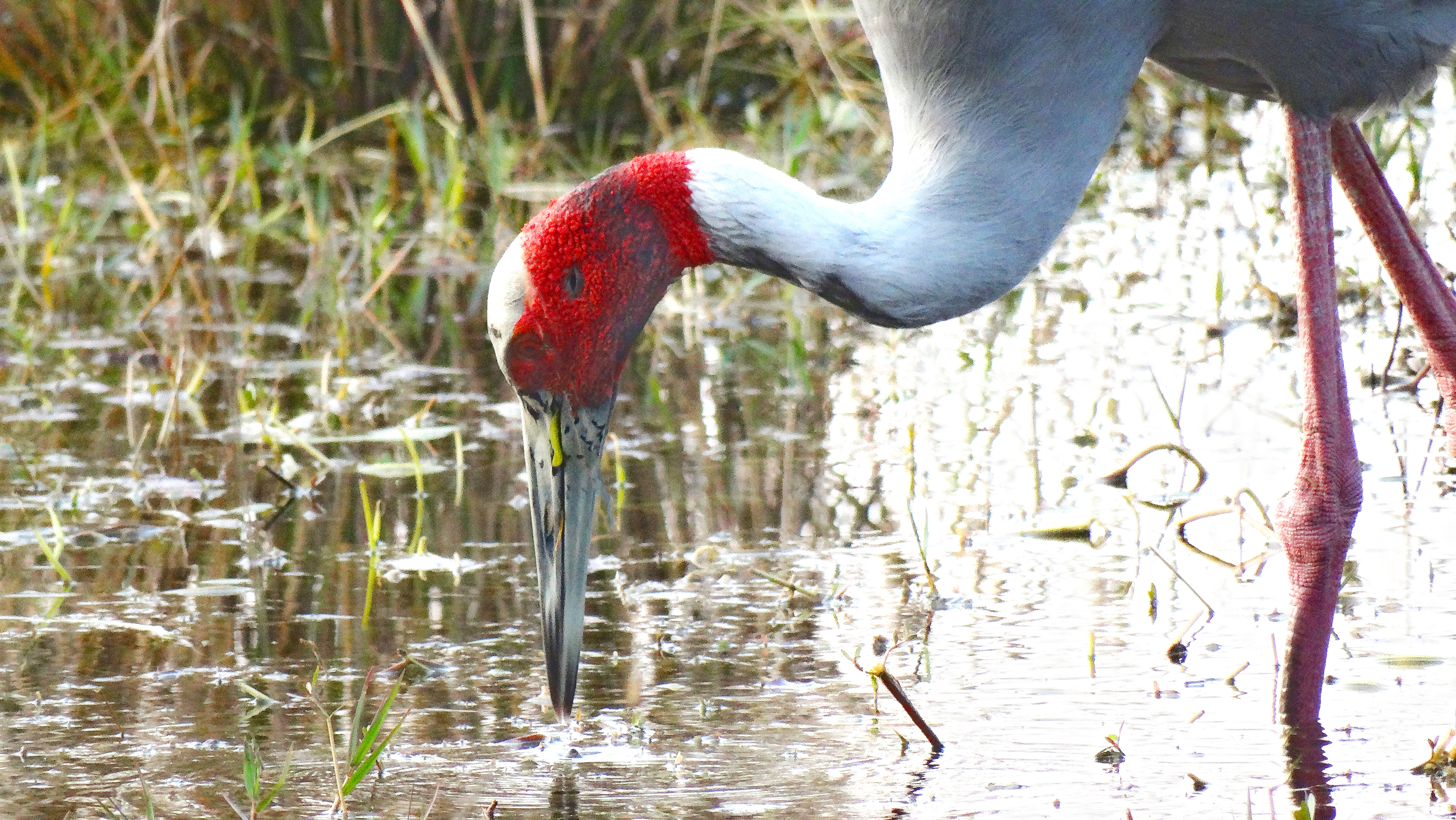 অসমীয়া: চাতক চৰাই, ভৰতপুৰ পক্ষী উদ্যানৰ ভিতৰত